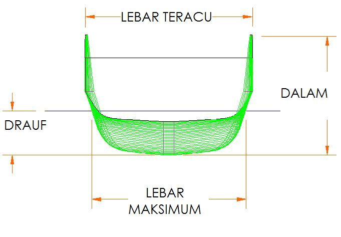 Struktur badan kapal